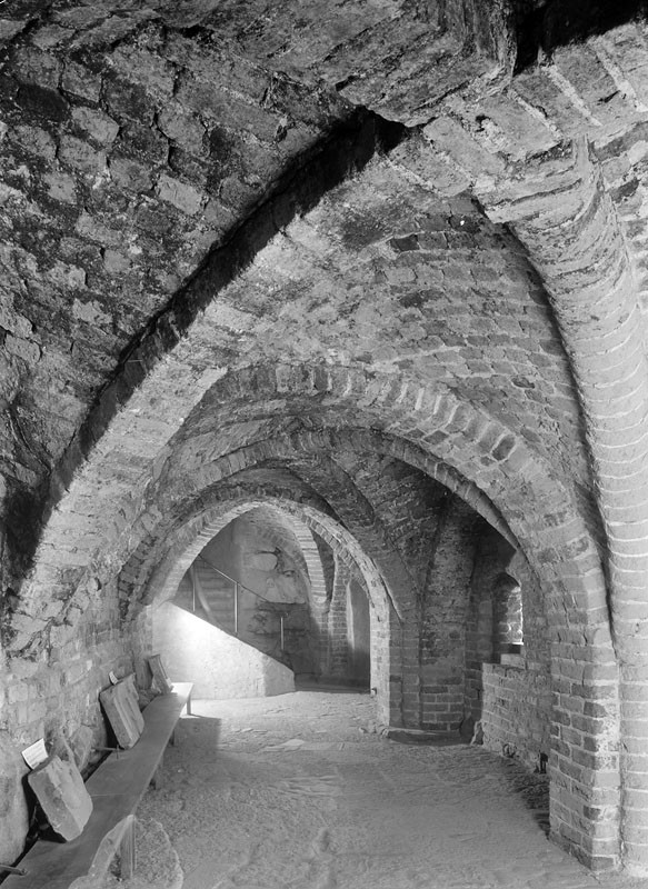 Svartbrödraklostrets källare. Murade valv från 1300-talet